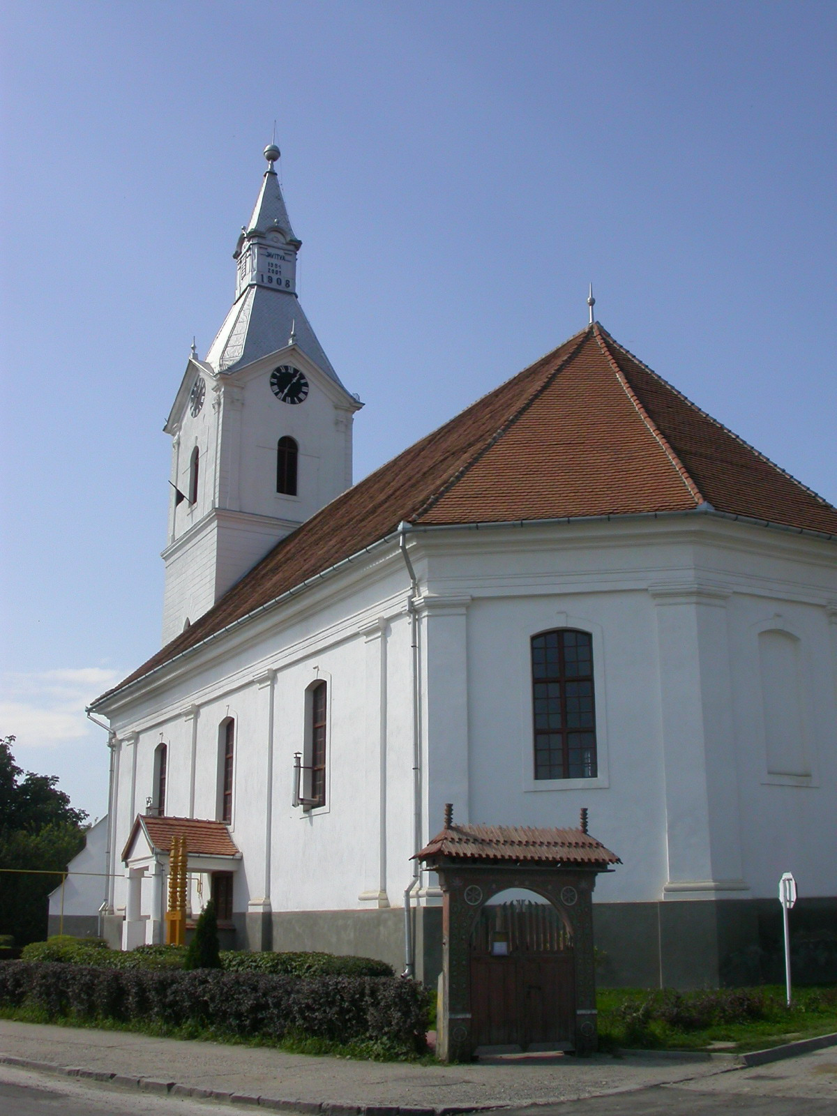 Biserica reformată, 1822 - 1834,1866